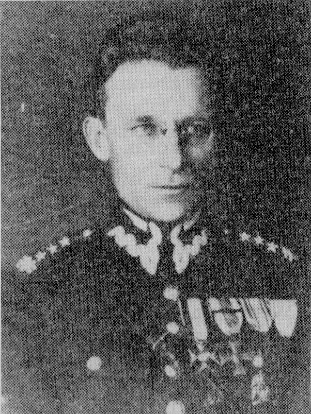 Płk Bohdan Stachlewski jako dowódca 25 p.uł.